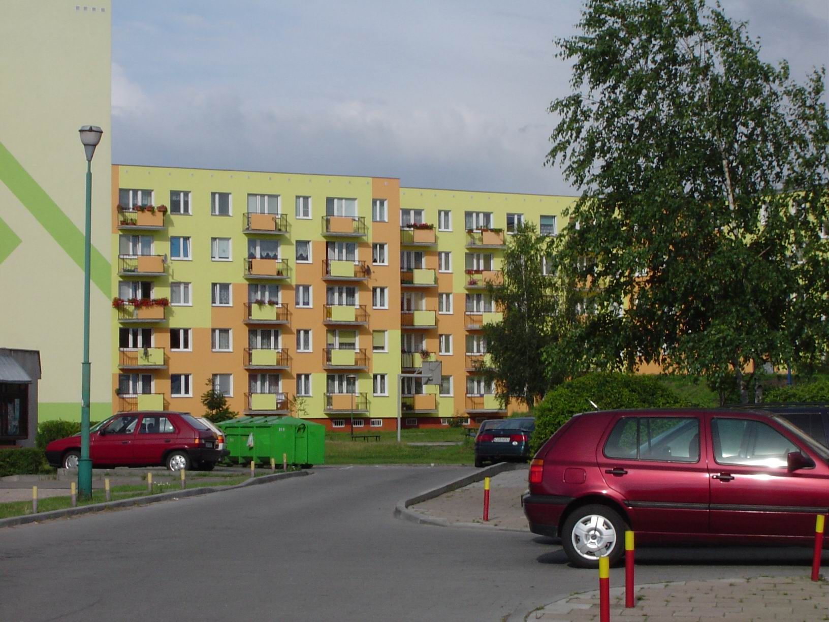 Odnowione bloki przy ul. Kustronia, os. Lotnisko, Grudziądz